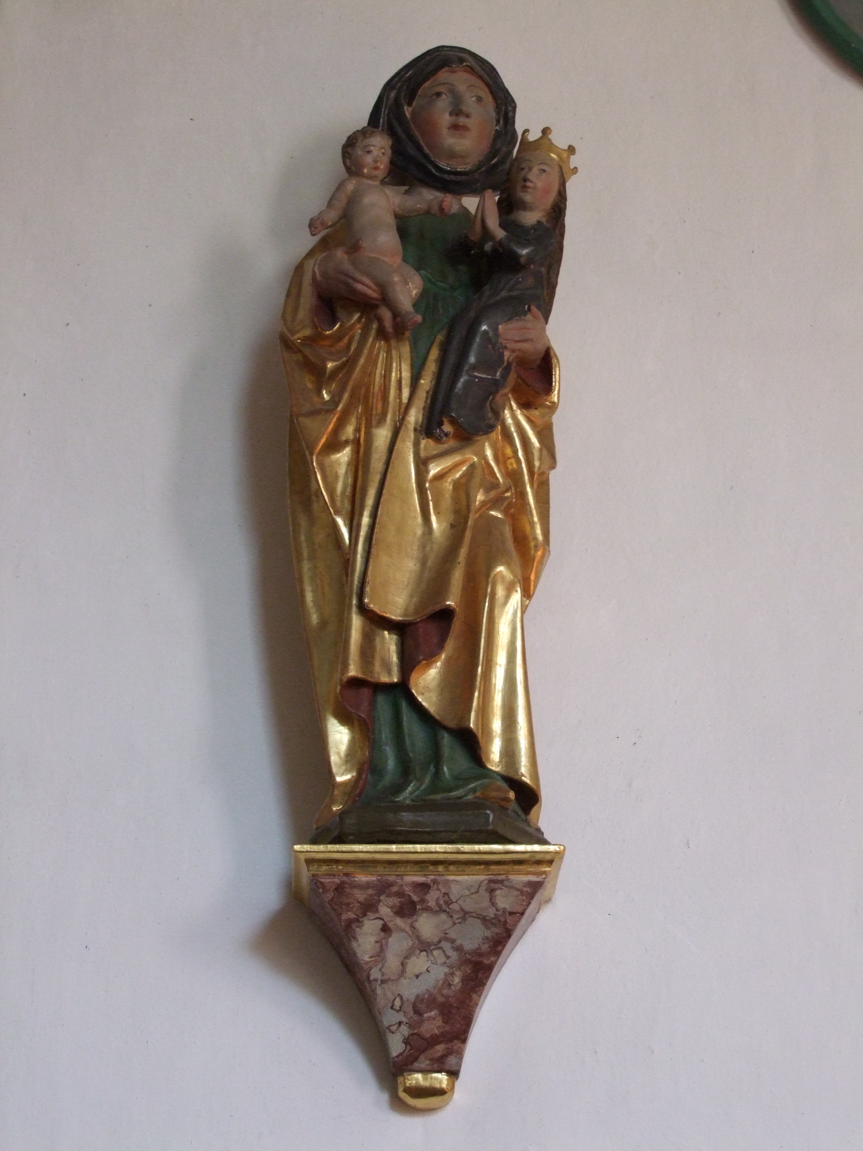 St. Franziskus und Georg im oberschwäbischen Altensteig, einem Ortsteil von Dirlewang in Bayerisch/Schwaben